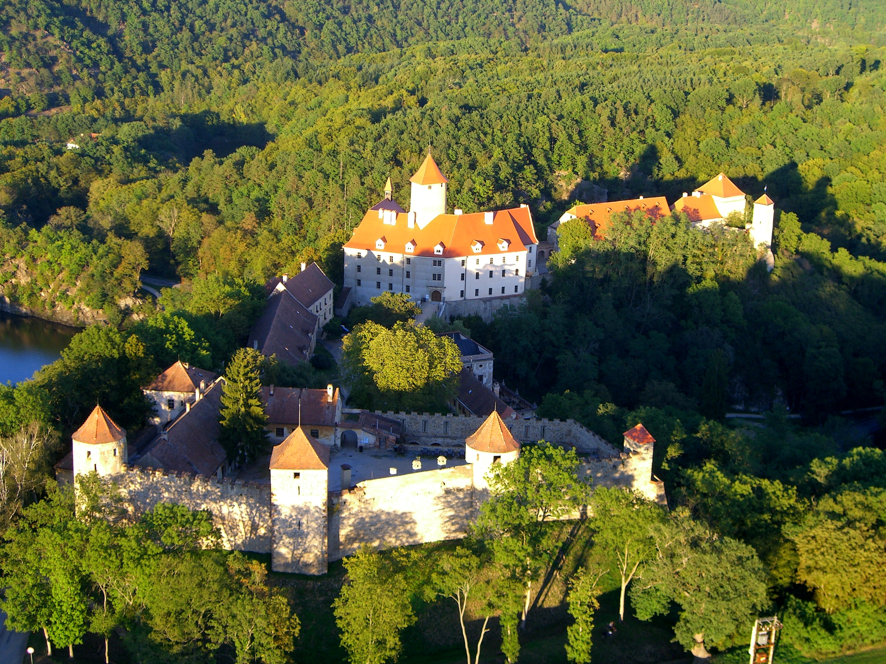 Hrad Veveří, pohled z horkovzdušného balónu.